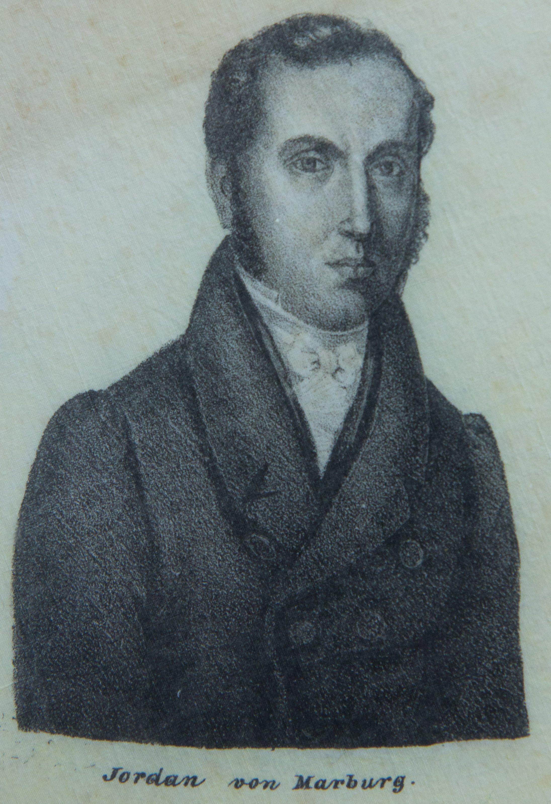 Hambacher Tuch, fotografiert im Archiv des Liberalismus in Gummersbach: Sylvester Jordan (1792-1861)